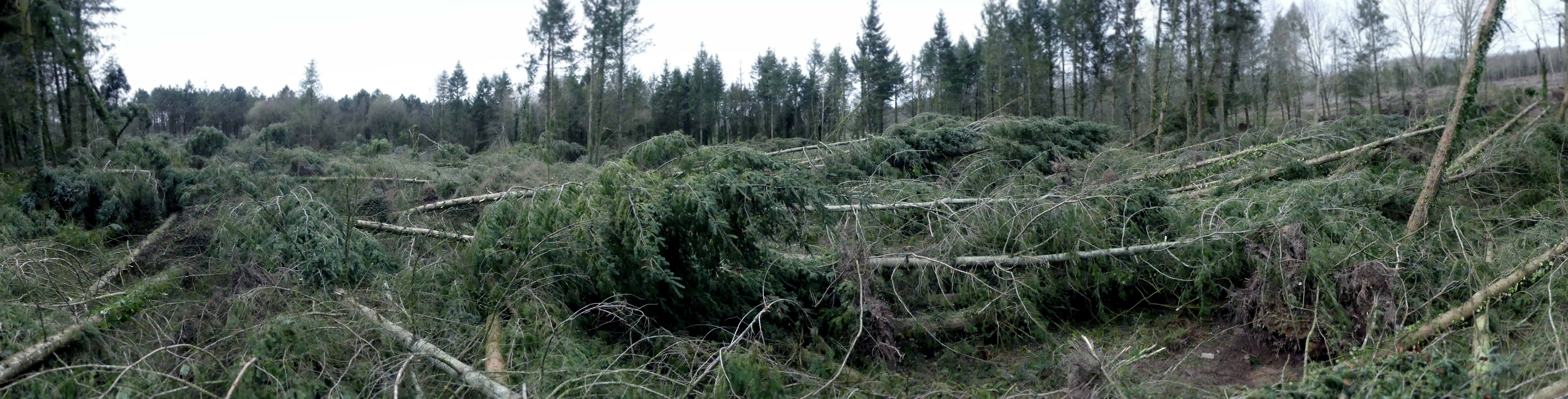 Au passage de la tempête Zeus les vents ont soufflé jusqu'à 180 km/H sur les côtes du Morbihan, département le plus touché par la tempête en Bretagne. 85000 foyers privés d'électricité, des dizaines d'arbres tombés, des toitures endommagées, un blessé, 370 sapeurs-pompiers engagés... Plus d'une centaine de sapins ont cédé sous la force des rafales de vent, dans une forêt non-loin de la commune de Crac'H.